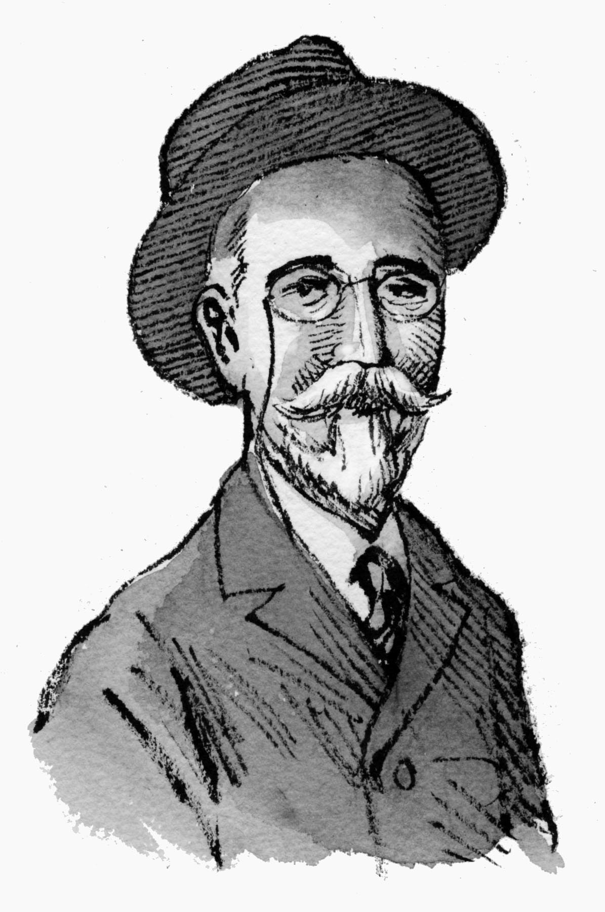 Portrait d'Aymar d'Arlot de Saint-Saud, pyrénéiste français